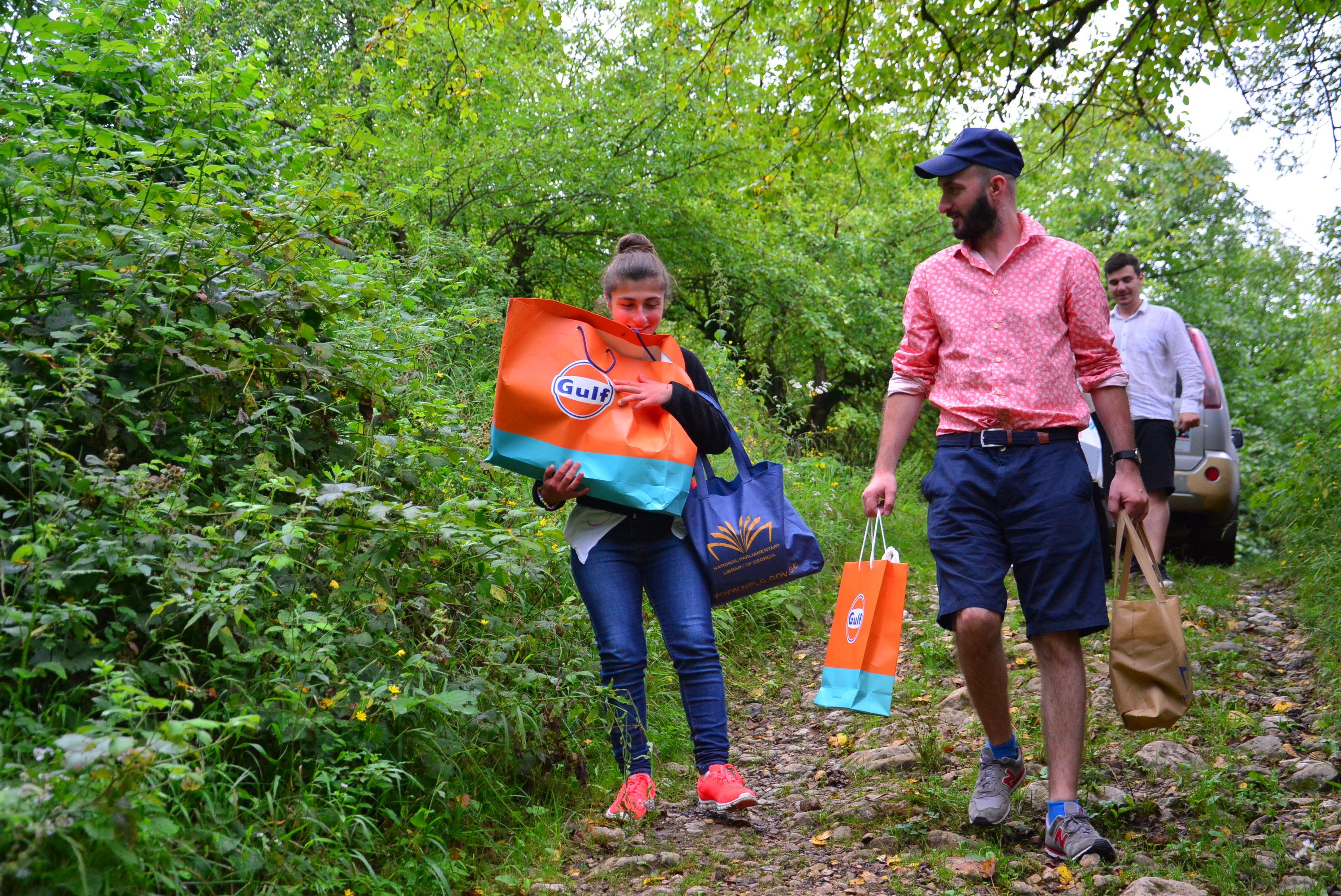 გიორგი კეკელიძე სტუმრობს მეათასე სოფელს პროექტ ეკვილიბრიუმის ფარგლებში